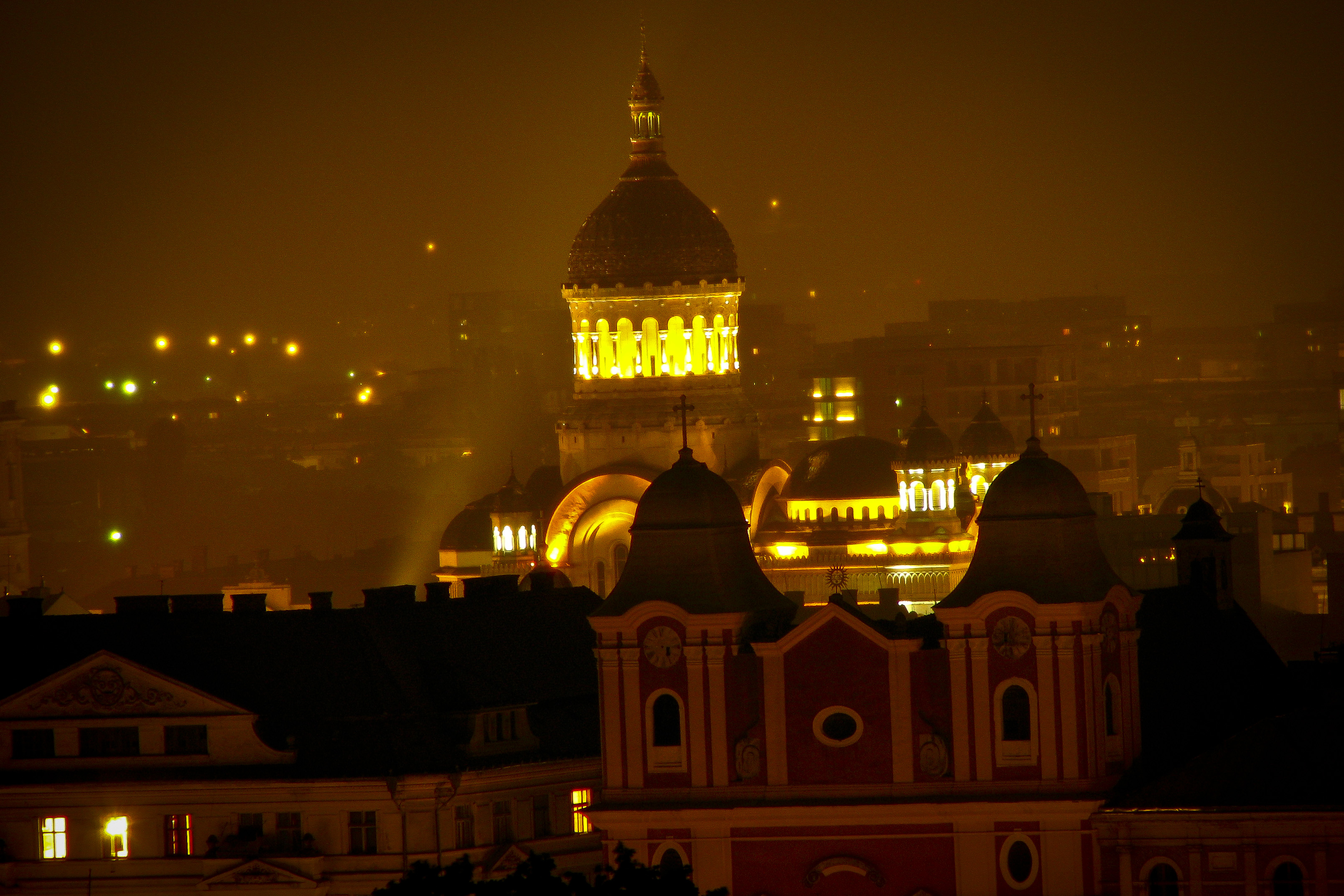 Catedrala Arhiepiscopiei ortodoxe, municipiul Cluj-Napoca, Piața Iancu Avram